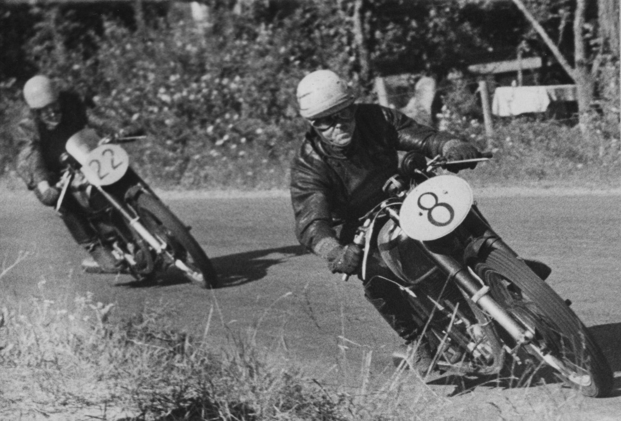 Hedemora Senior 1950; Nr.8. Han vandt efter at have repareret et brækket stel det meste af natten